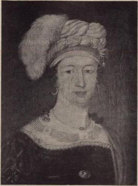 Norwegian: Statsrådinne Christine Aall, f. Blom, gift med Niels Aall.